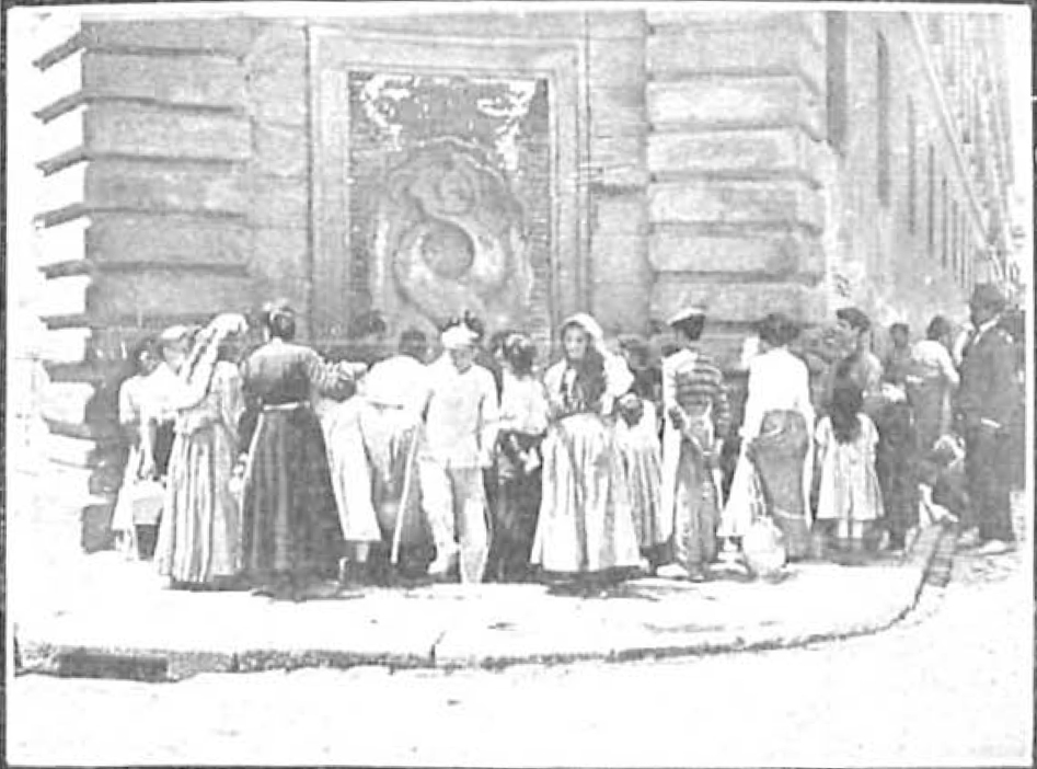 Fotos de varias fuentes de Madrid.